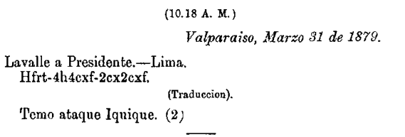 mensaje cifrado de Jose Antonio Lavalle